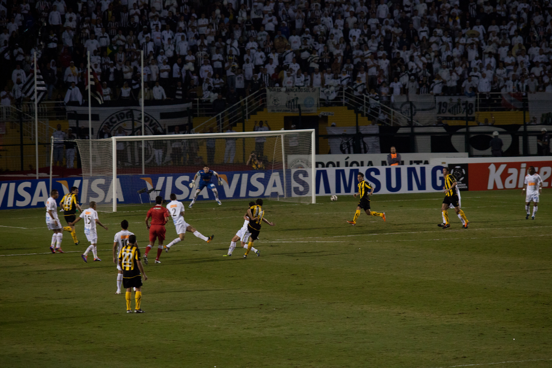 Santos: Rafael, Danilo, Edú Dracena, Durval, Leo (68´ Alex Sandro); Adriano, Arouca, Elano, Paulo Henrique Ganso (87´ Pará); Zé Eduardo y Neymar. DT: Muricy Ramalho. Peñarol: Sebastián Sosa; Alejandro González (38´ Emiliano Albín - 70´ Fabián Estoyanoff), Carlos Valdez, Guillermo Rodríguez, Darío Rodríguez; Matías Corujo, Nicolás Freitas, Luis Aguiar, Matías Mier (62´ Jonathan Urretaviscaya); Juan Manuel Olivera y Alejandro Martinuccio. DT: Diego Aguirre. Goles: Neymar (SAN) 47’ y Danilo (SAN) 68’, Durval en contra 79’ (PEÑ). Amarillas: Alejandro González (PEÑ), Neymar (SAN), Matías Corujo (PEÑ), Ze Eduardo (SAN), Nicolás Freitas (PEÑ). Jueces: Sergio Pezotta, Ricardo Casas y Hernán Maidana y (Argentina). Estadio: Pacaembú, Sao Paolo, Brasil. Camera: Canon EOS 5D Mark II 6 ISO: 3200